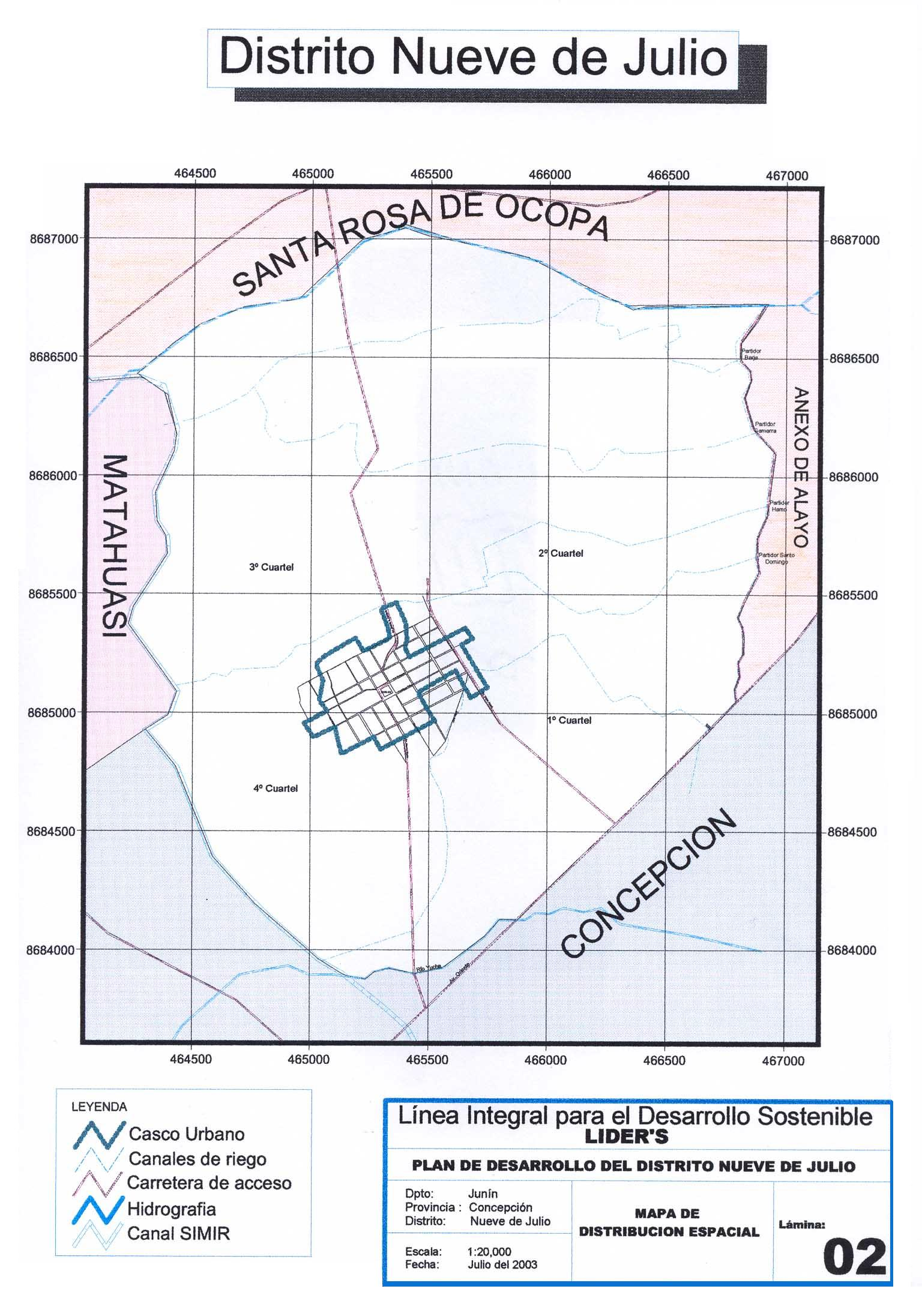 Mapa Del Distrito Nueve de Julio